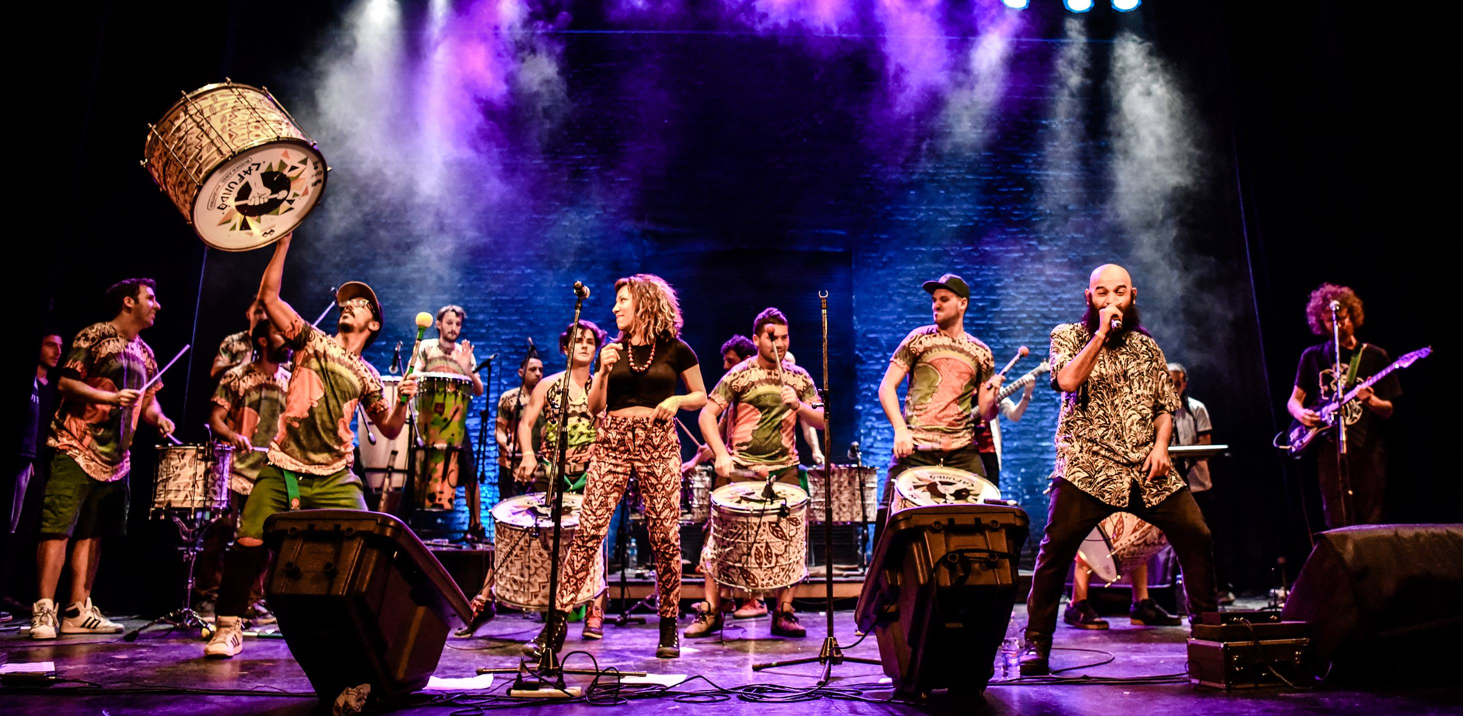 Presentación en vivo de Banda Cafundó